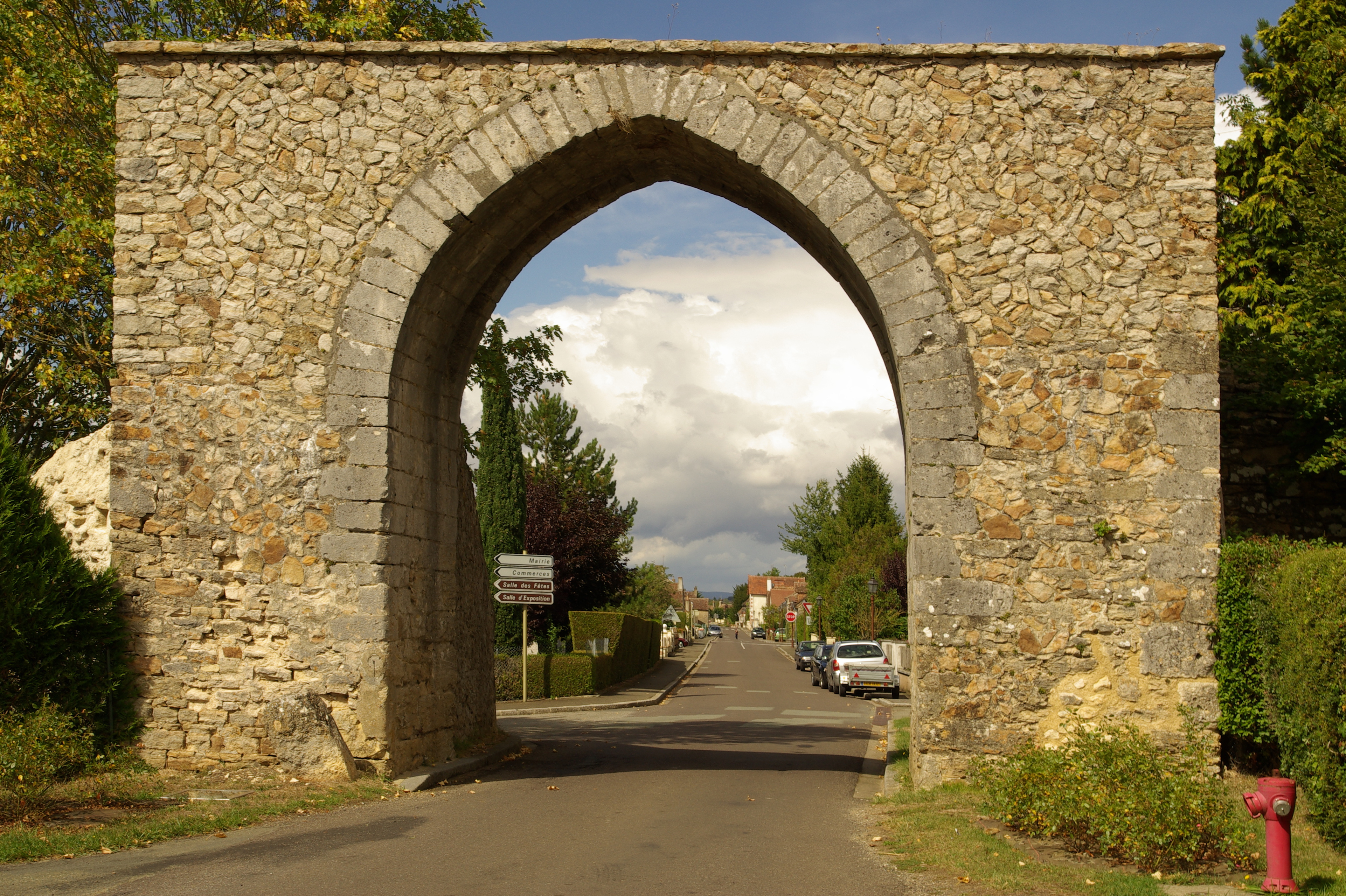 La porte Saint-Mathurin à l'une des entrées du village de Bourg-le-Roi, Sarthe.